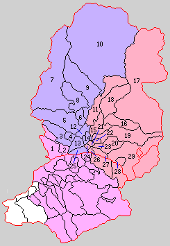 山梨県東山梨郡の町村。